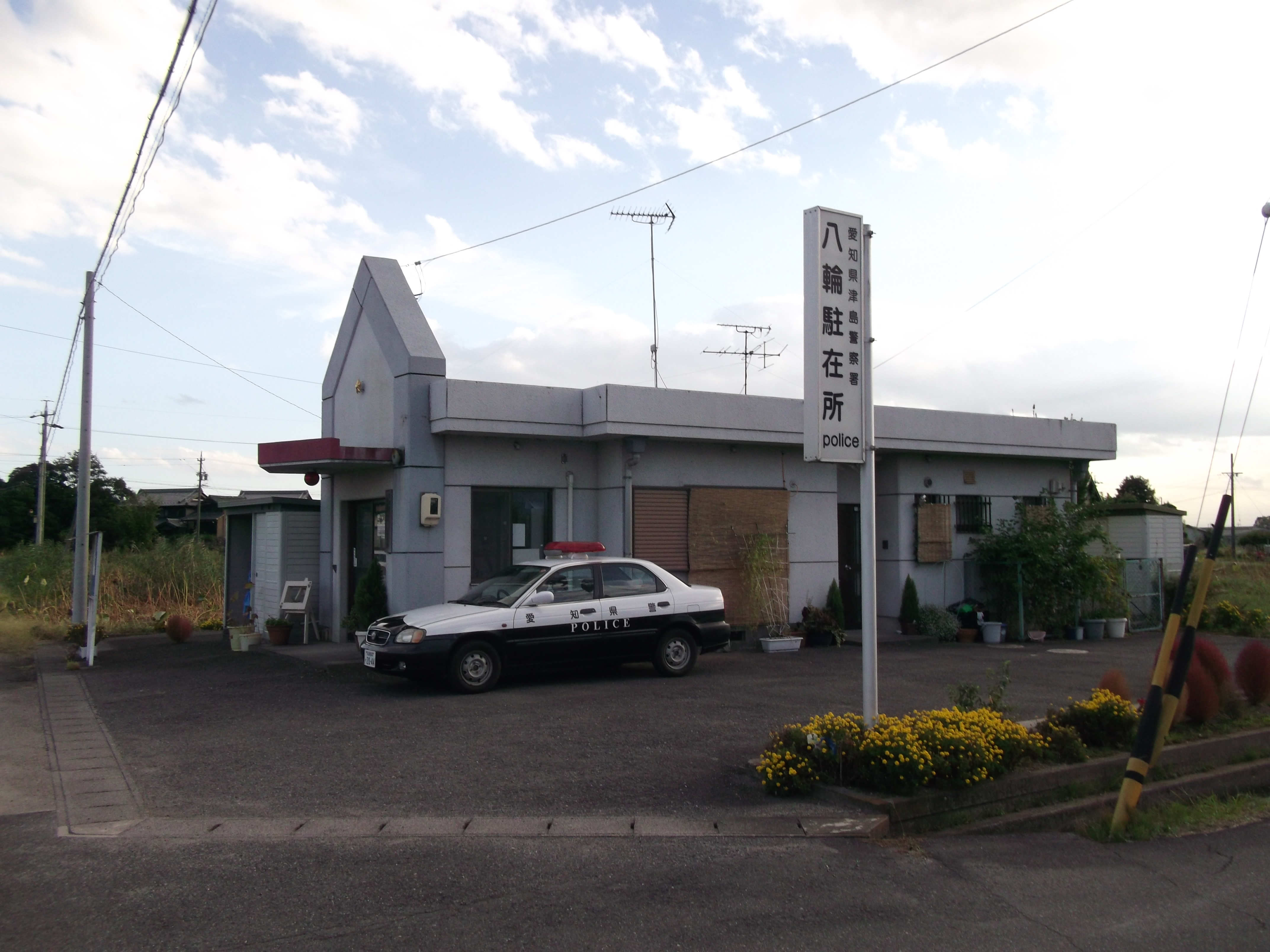 愛西市赤目町の愛知県警津島警察署八輪駐在所を西側公道北側より撮影